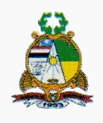 Brasão do Municipio de Amarante do Maranhão.